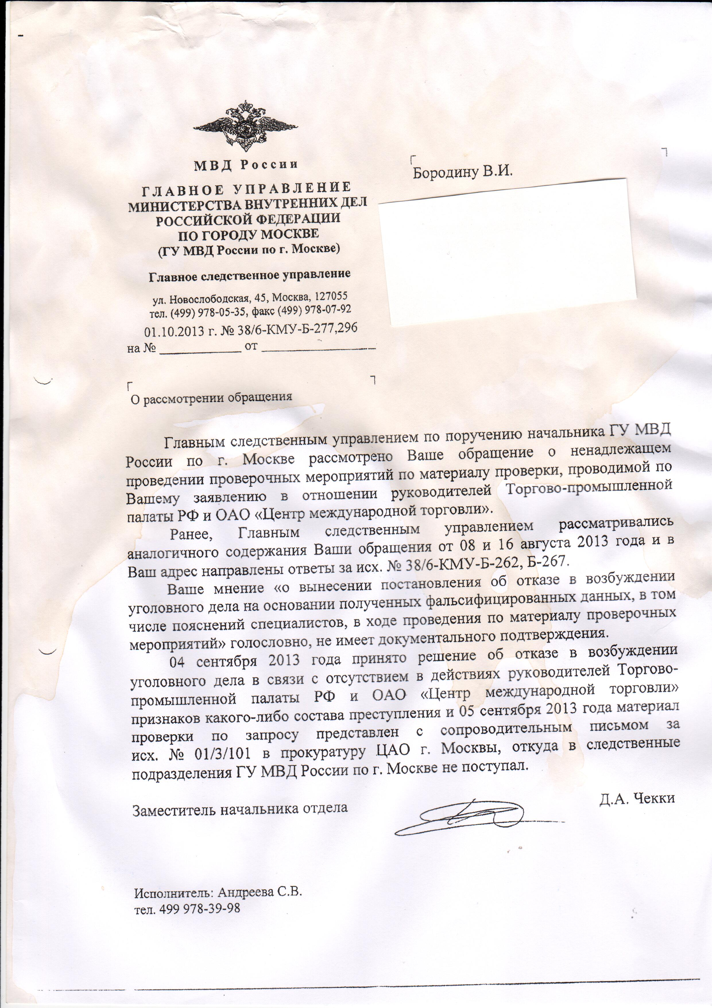 Ответ Бородину В.И. из МВД